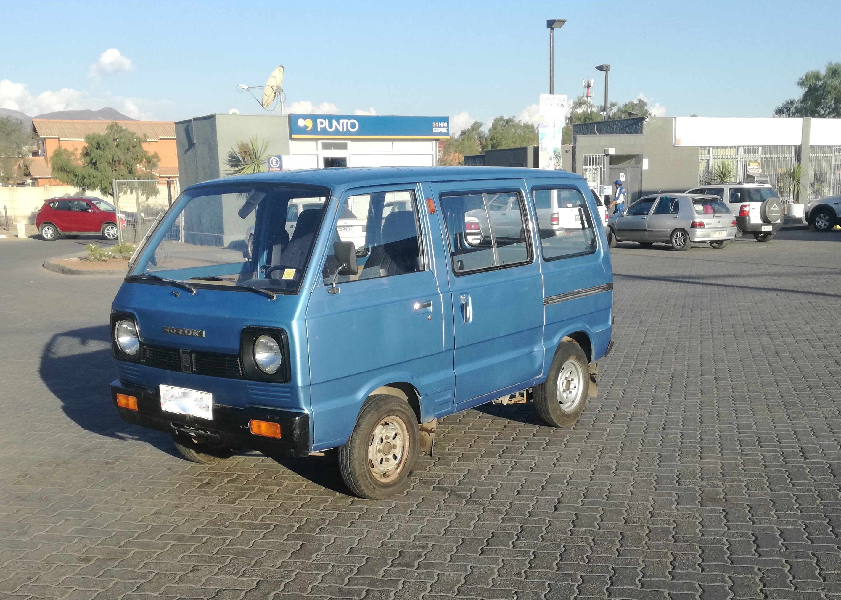 ST90 Versión para 8 pasajeros, luego de cargar combustible.